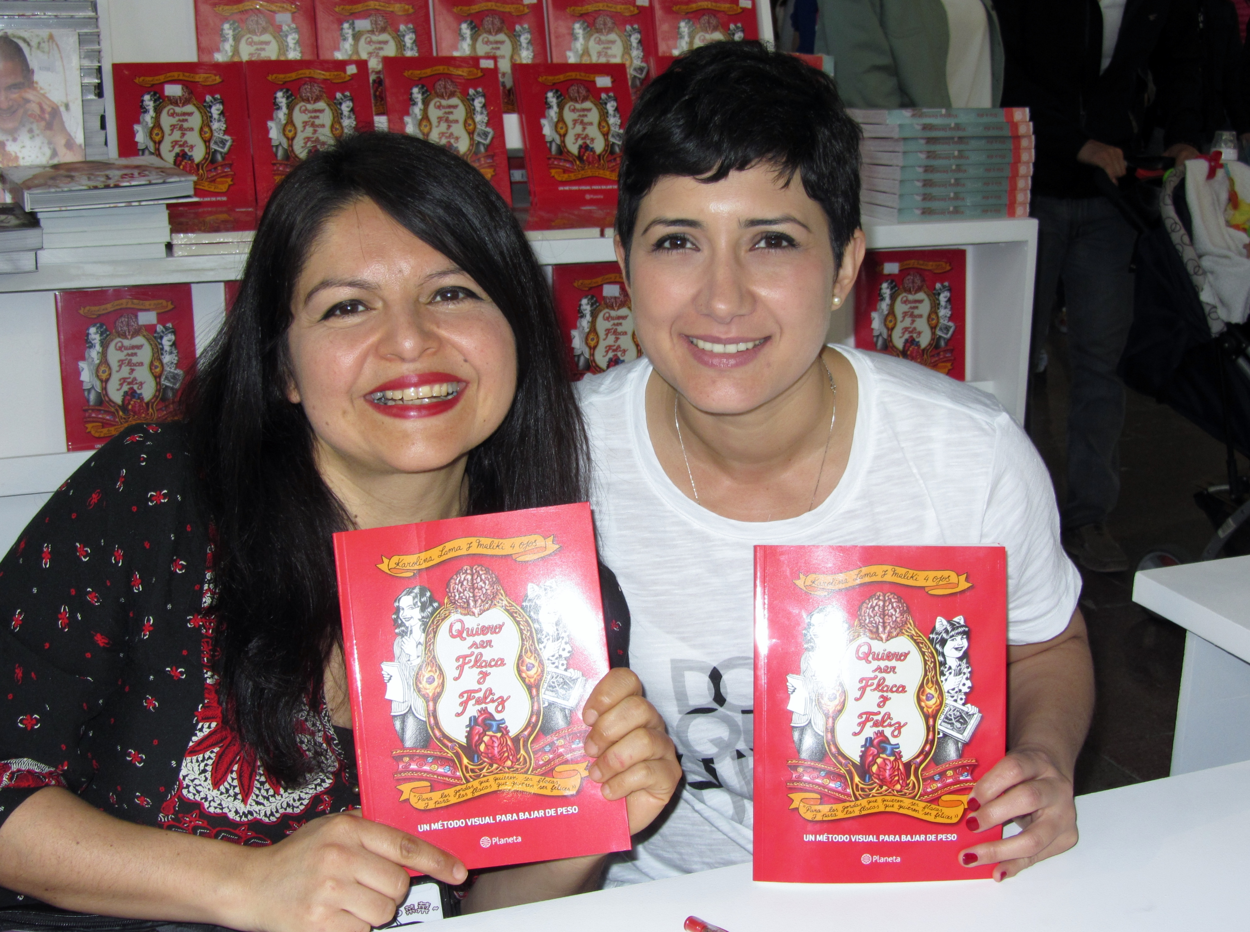 La artista visual chilena Marcela Trujillo y la sicóloga Karolina Lama en la Feria Internacional del Libro de Santiago 2015